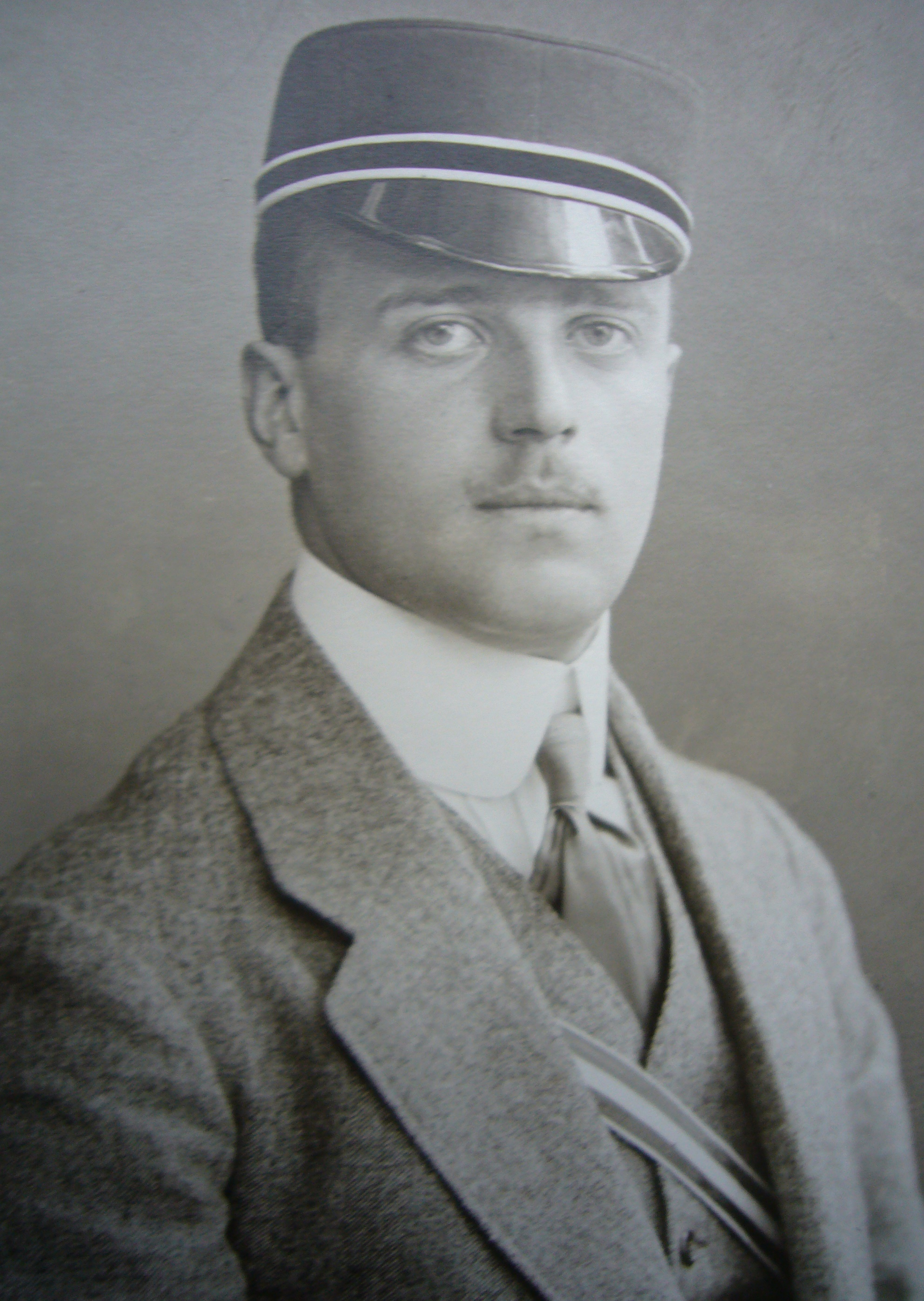 Porträtfotografie von Max Meyer als Student in Straßburg